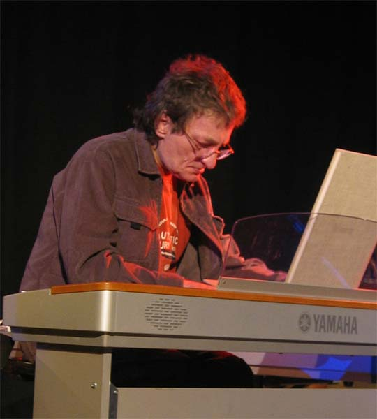 Marian Varga, Slovak musician